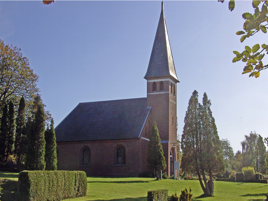 fra nordvest